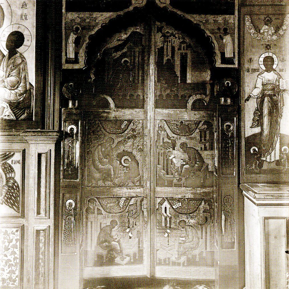 Царские врата в церкви Димитрия Солонуского в Старой Ладоге